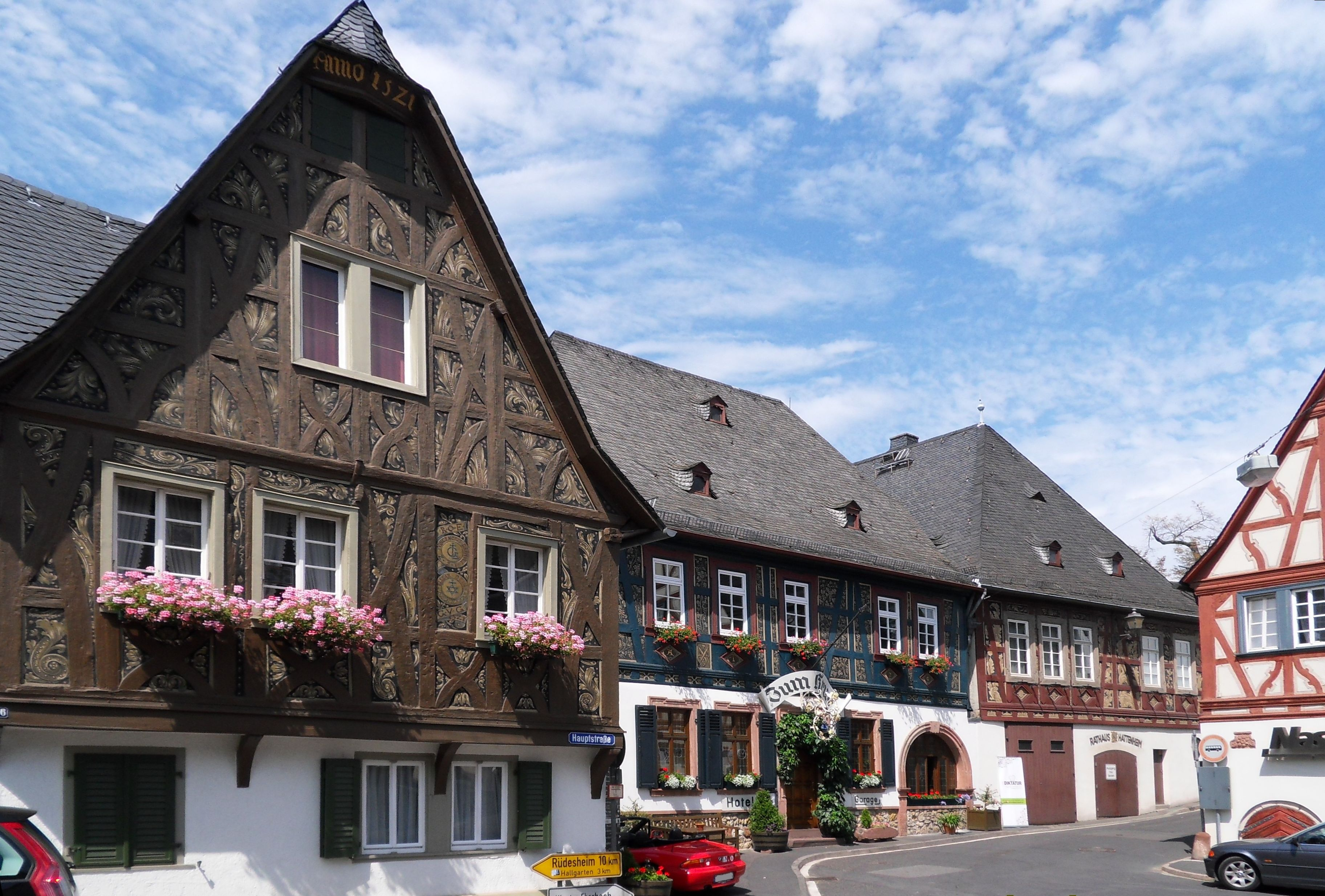 Fachwerkäuser und Rathaus in der Ortsmitte von Hattenheim im Rheingau, Blick von Süden